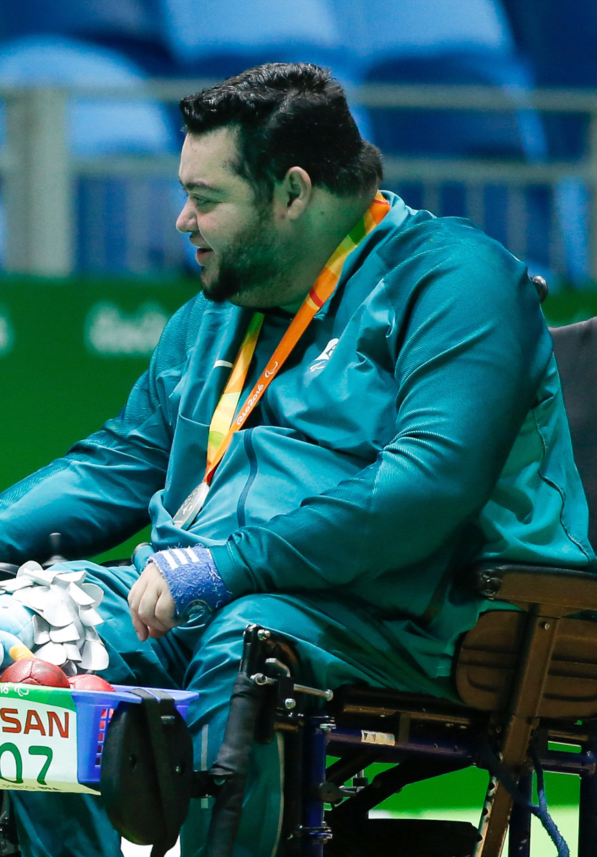 Rio de Janeiro - Brasileiros ficam com medalha de prata após derrota para Eslováquia na final da bocha BC4 nos Jogos Paralímpicos Rio 2016 (Fernando Frazão/Agência Brasil)